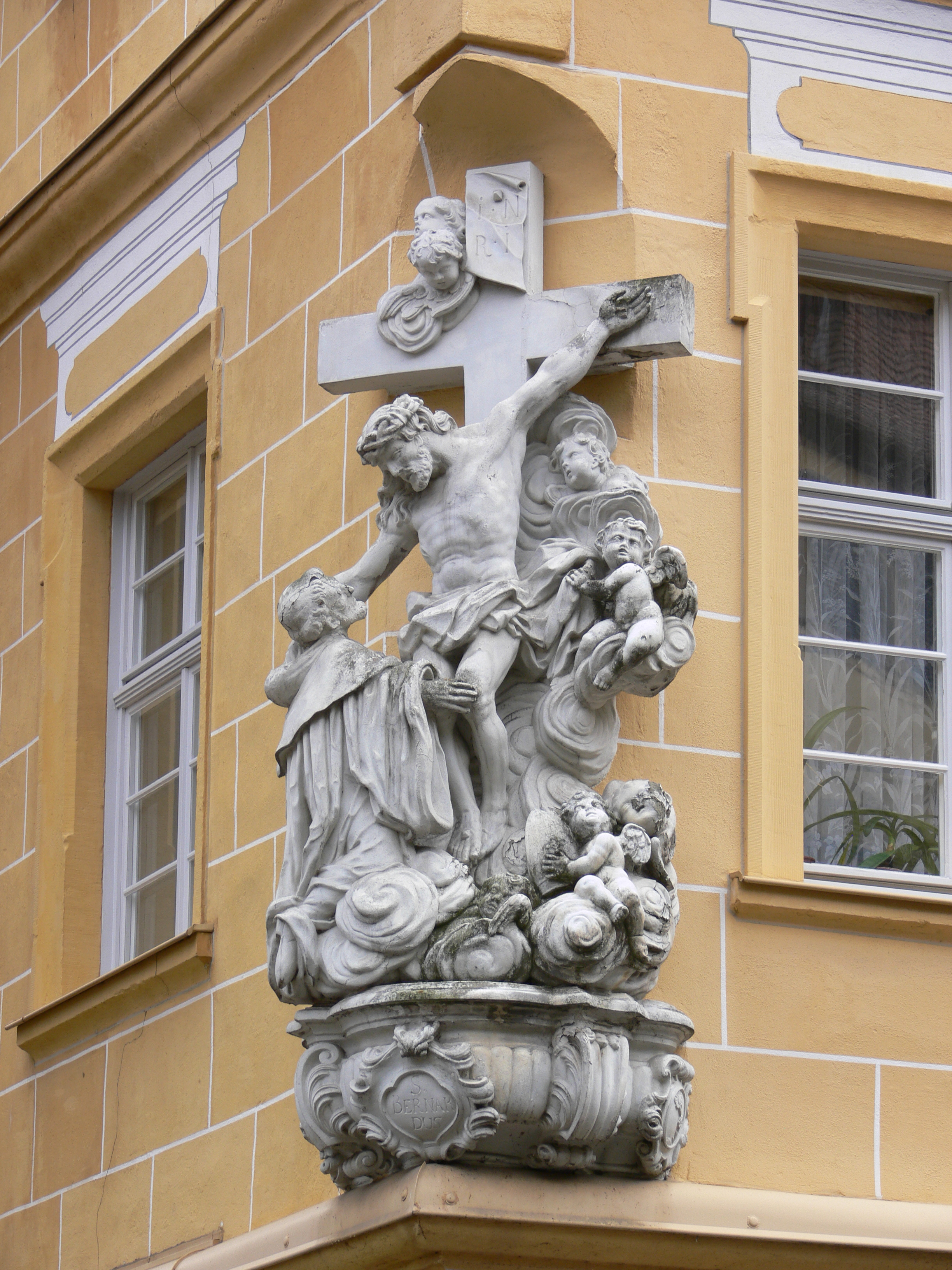 Bamberg, Alter Ebracher Hof, Bernhardskreuz von 1738 von Daniel Friedrich Humbach